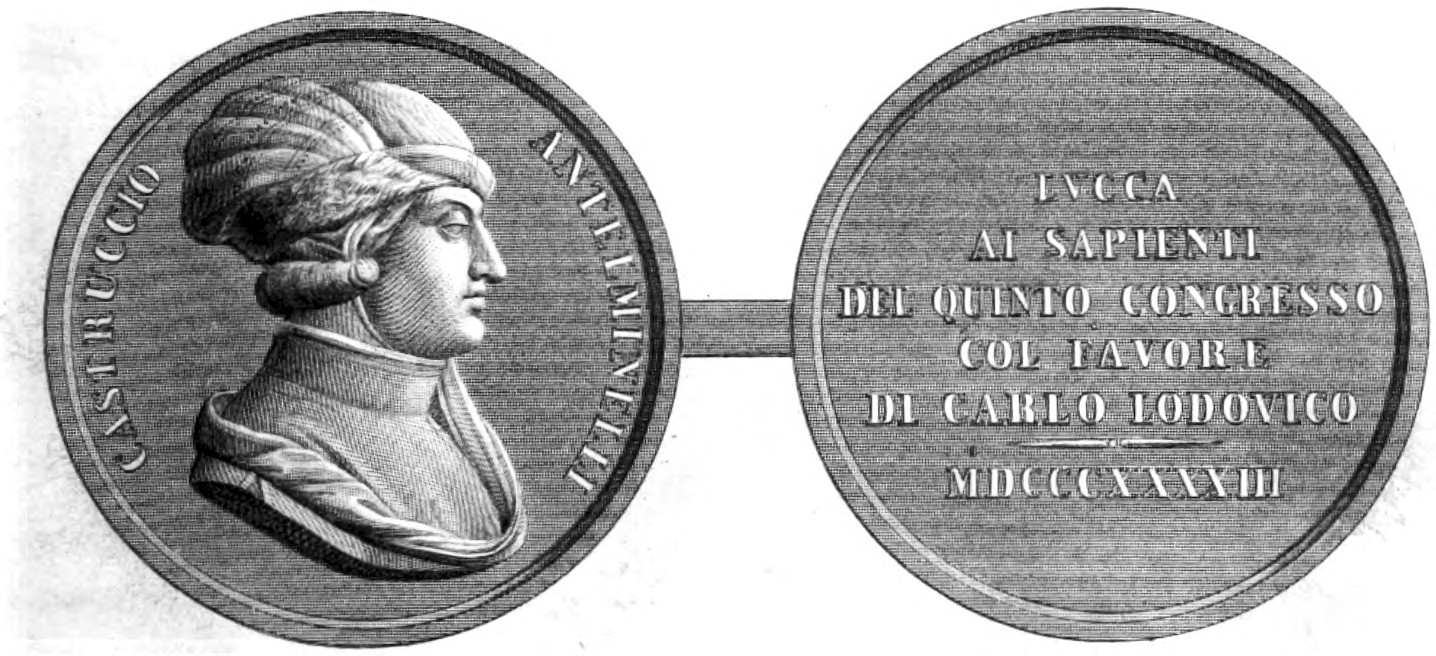 Medaglia per la quinta riunione degli scienziati italiani